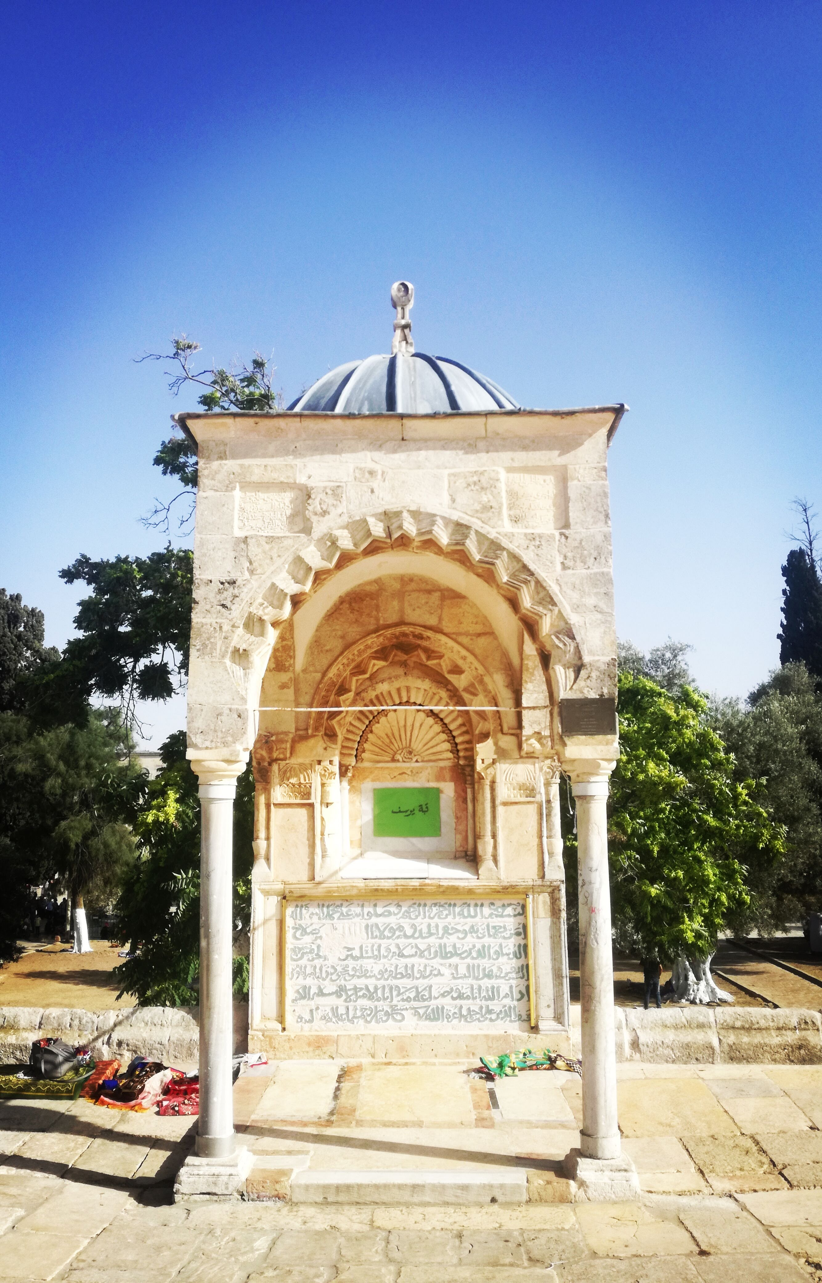 قبة يوسف داخل ساحات المسجد الأقصى